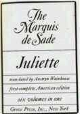 Juliette (novel) title page